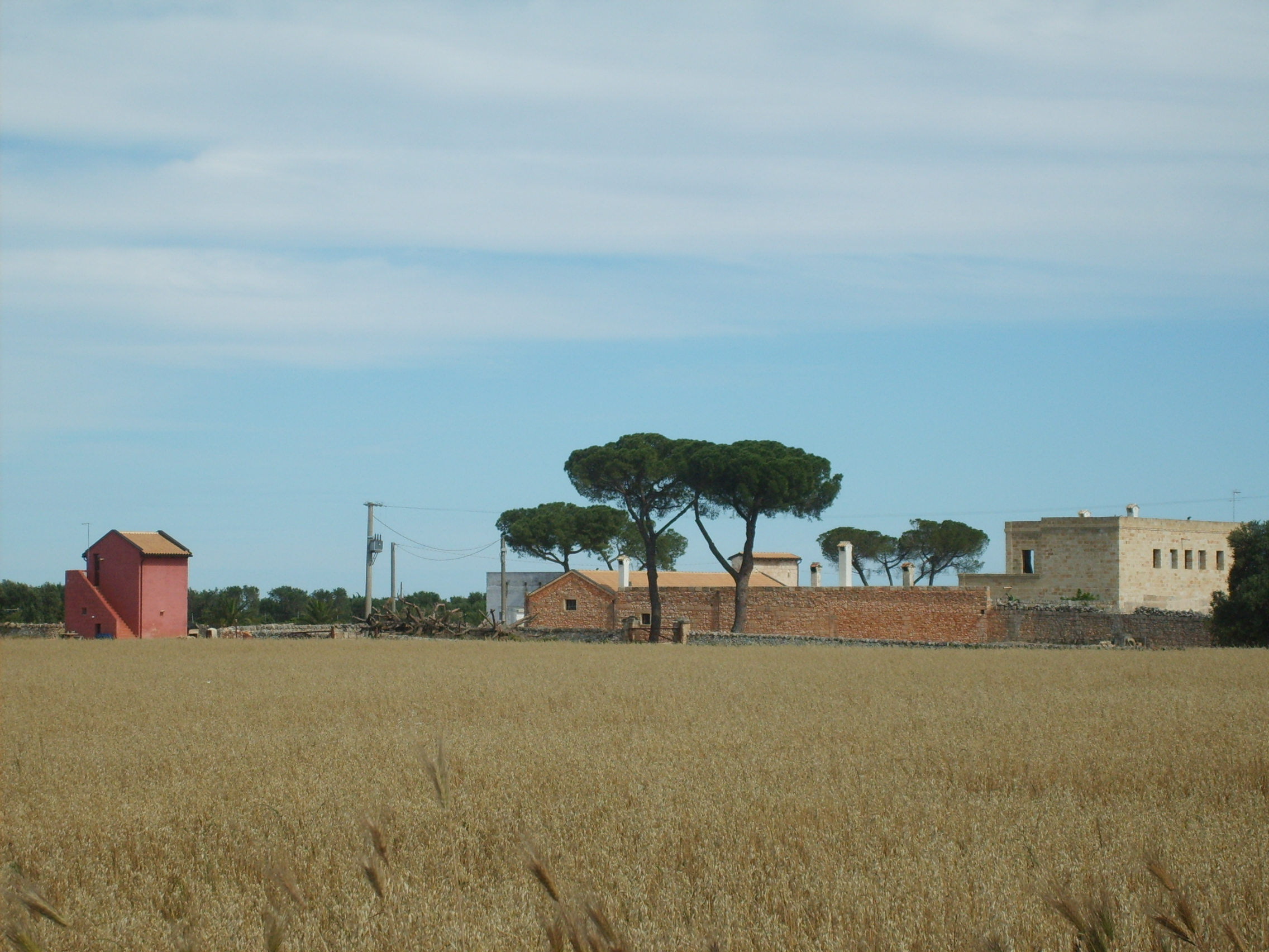 Vista della Masseria Tredicina, Francavilla Fontana